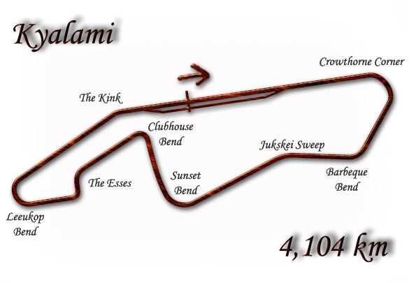 Grand Prix Formula 1 /1968-1985/ Autor: Jiří Žemlička